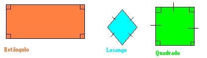 Paralelogramos, feito por Guilherme Augusto de Matheucci e S. Teixeira